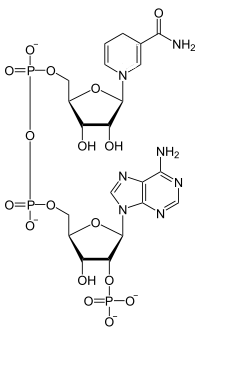 Le nicotinamide adénine dinucléotide phosphate réduit(NADPH)